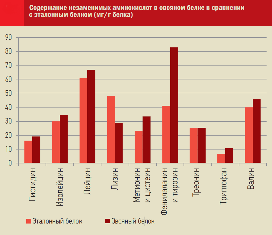 Сравнение аминокислотного состава овсяного белка с эталонным белком по версии ФАО/ВОЗ, 2013.